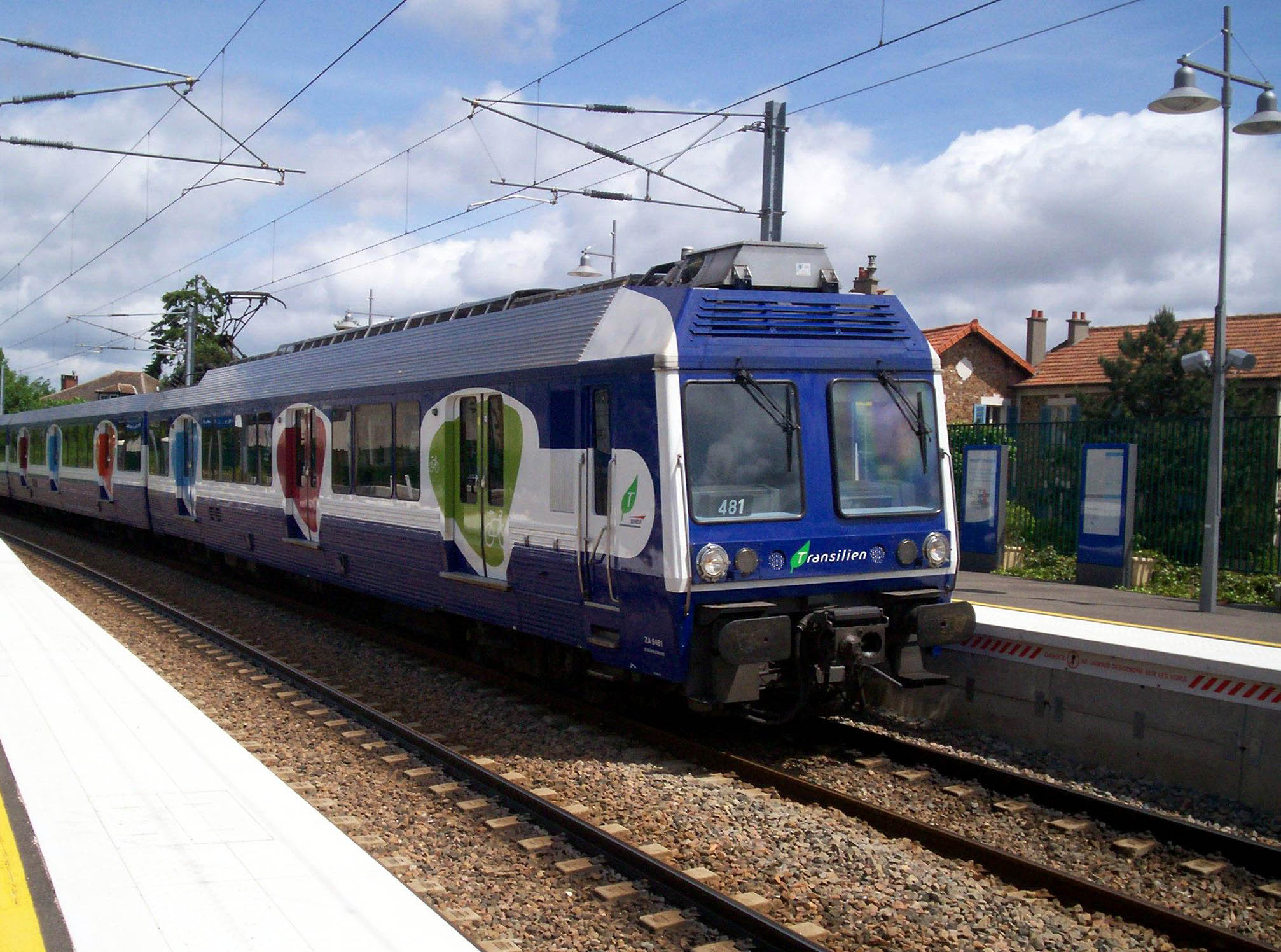 Photo d'une des 3 rames Z6400GCO arrivant en gare de Mareil-Marly, assurant le code mission NOIS.